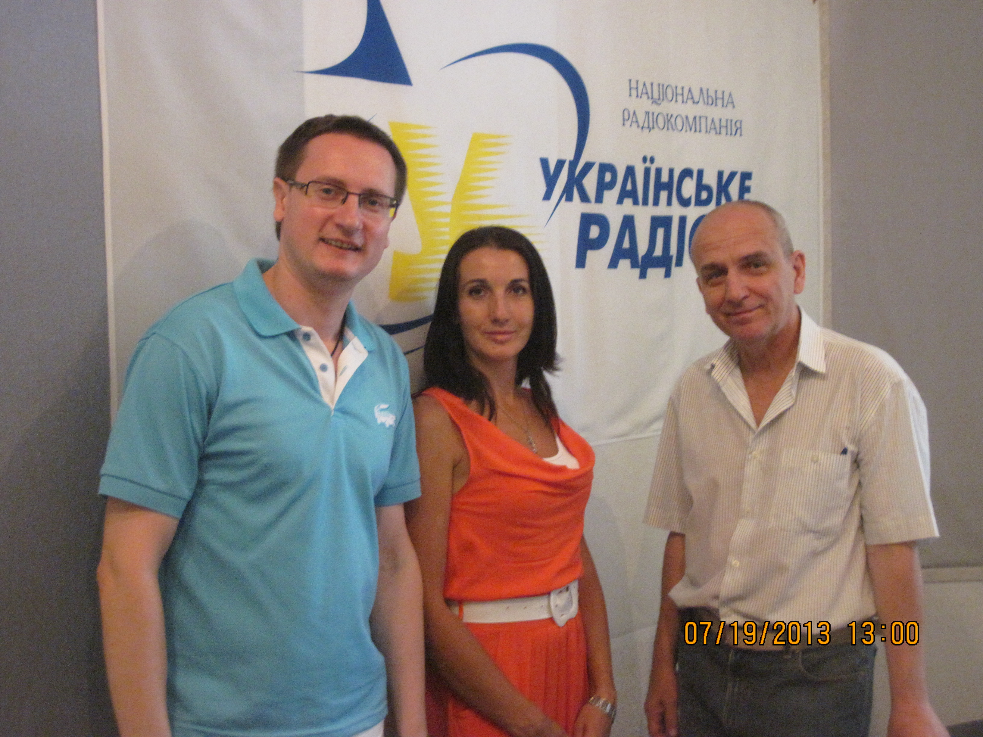 Співаки Влад Зайцев та Оксана Радул з ведучим Ігорем Стратієм в студії Національного радіо, Київ, Хрещатик 26